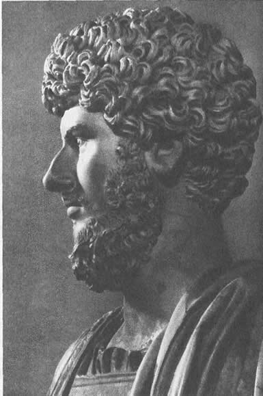 Луций Вер. Мрамор. Санкт-Петербург. Эрмитаж